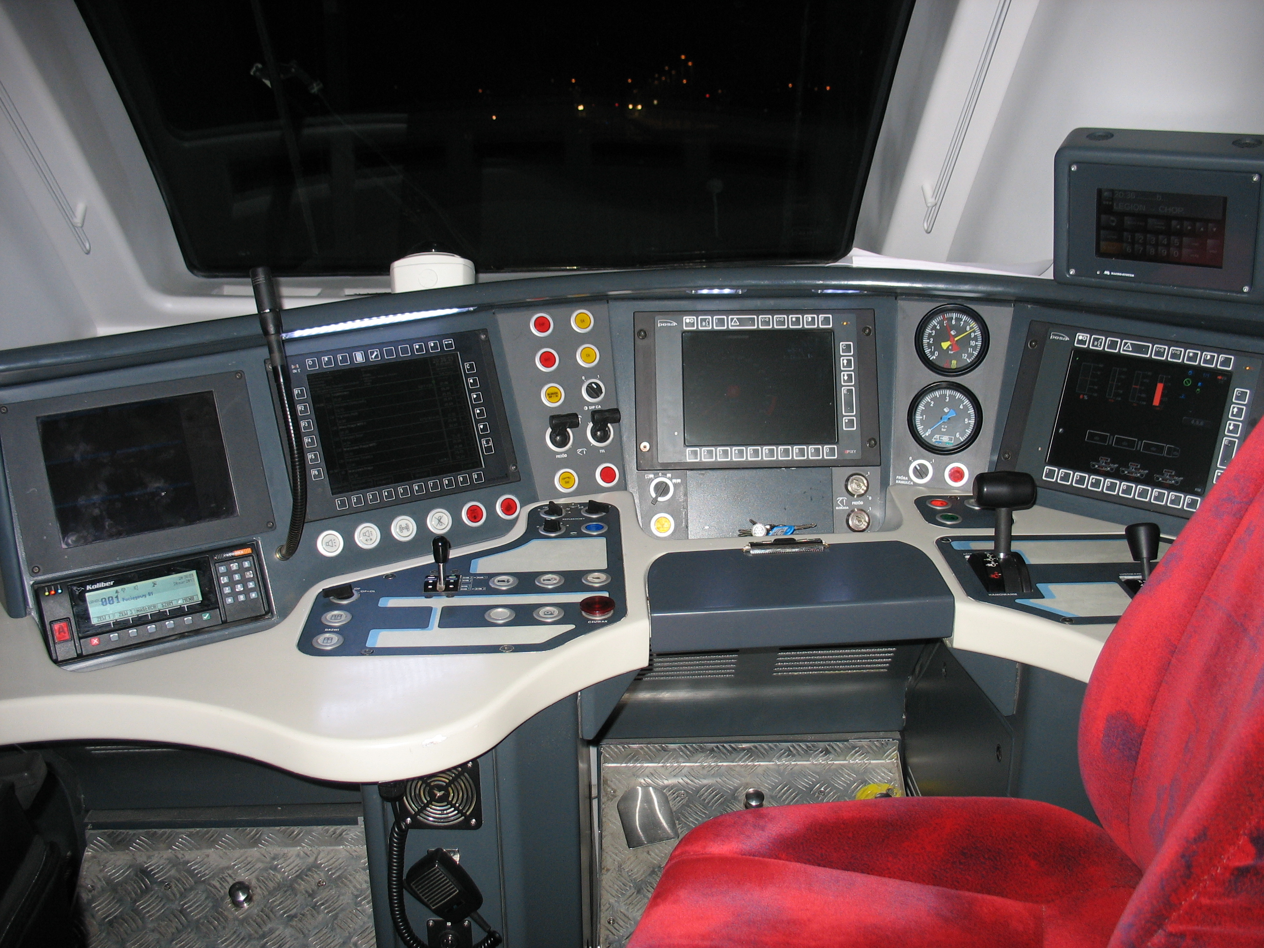 Pulpit maszynisty w kabinie 27 WE, przy włączonym oświetleniu górnym.